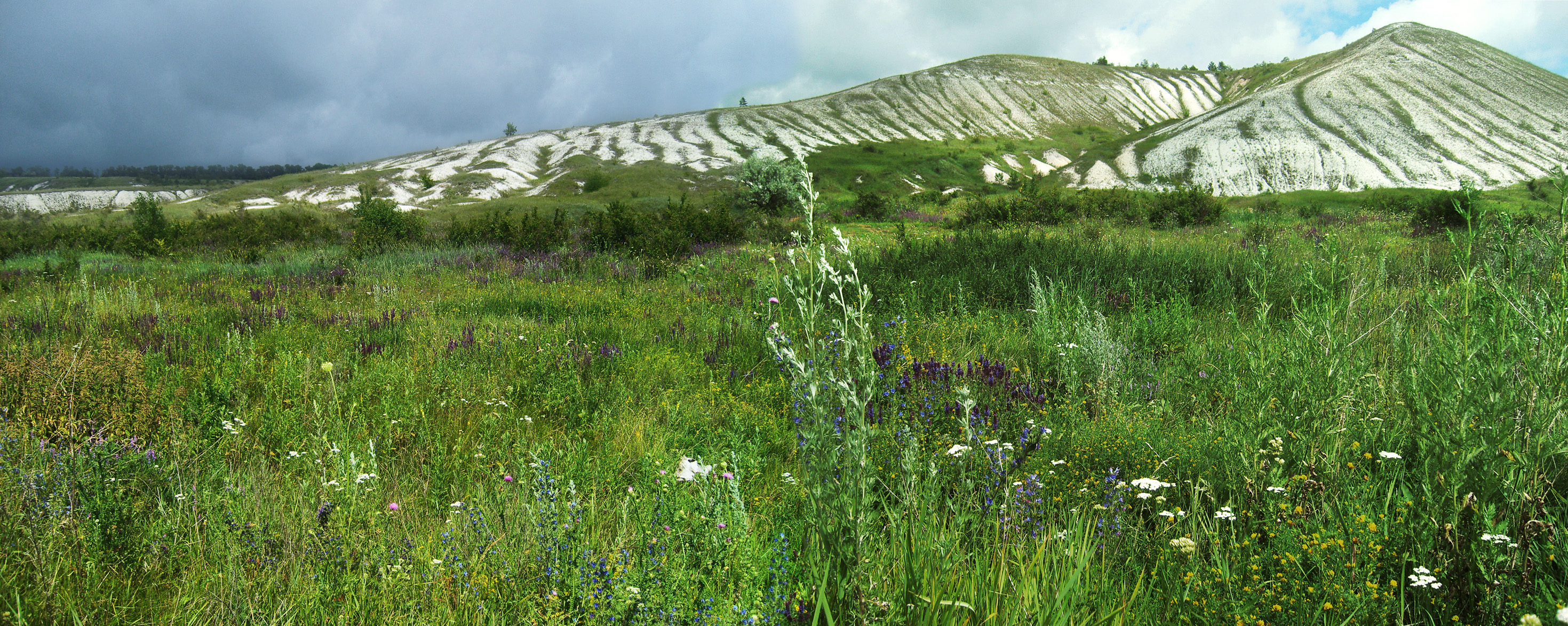 Меловые склоны в окрестностях участка «Стенки Изгорья». Заповедник «Белогорье», Белгородская область.